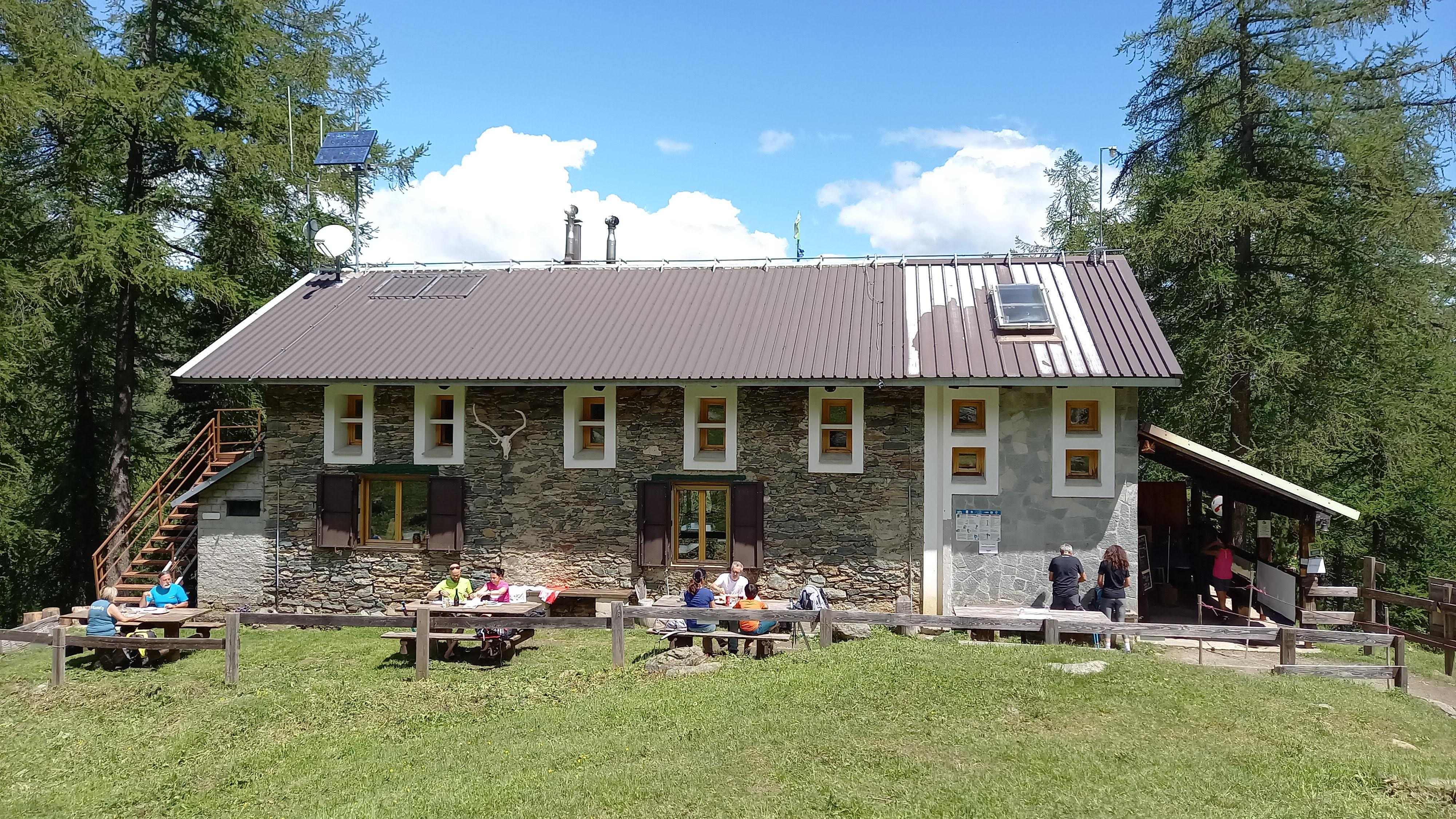 Il Rifugio Toesca di Bussoleno fotografato da sud il 14 giugno 2020.